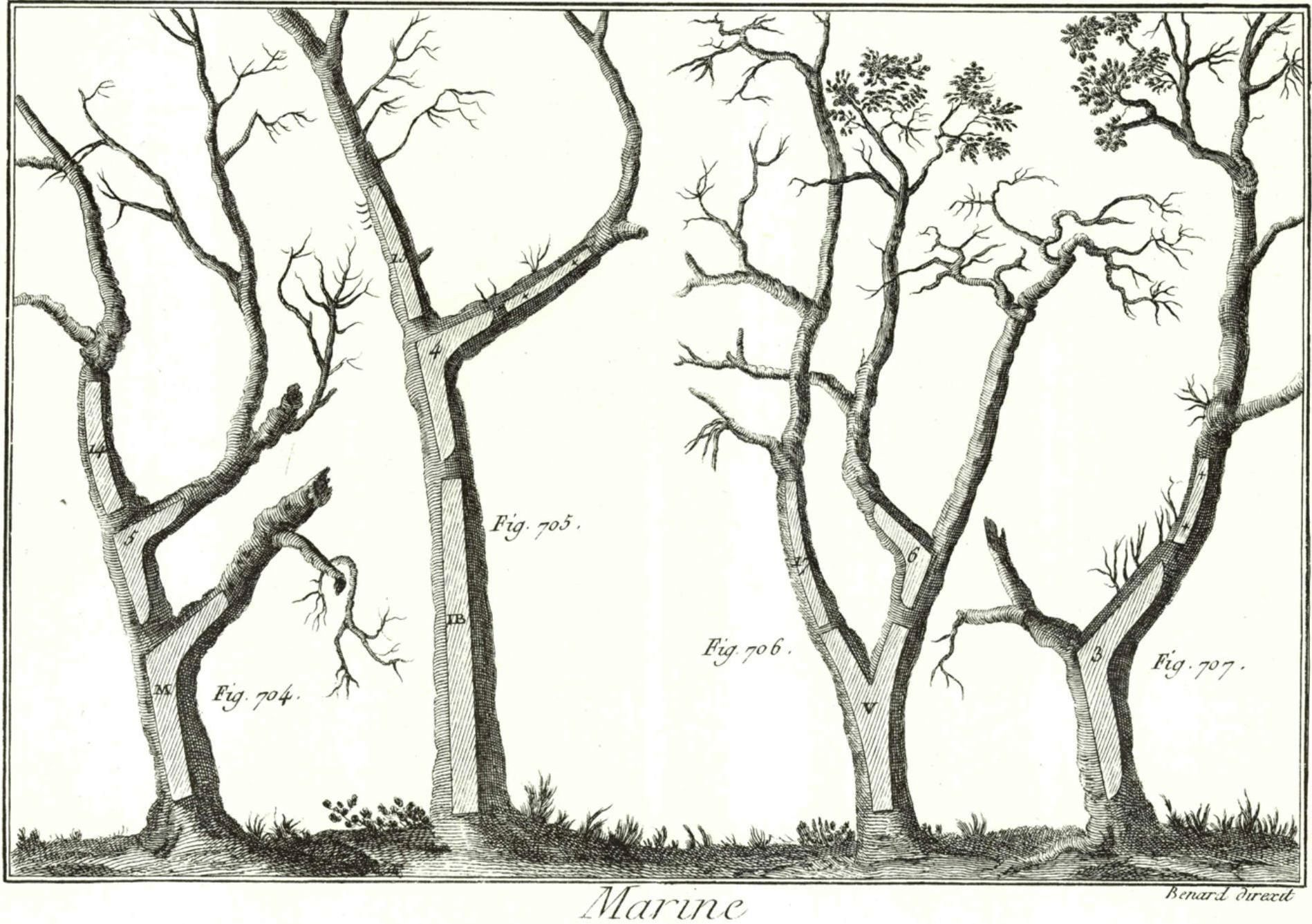 Planche extraite de l'Encyclopédie méthodique Marine.